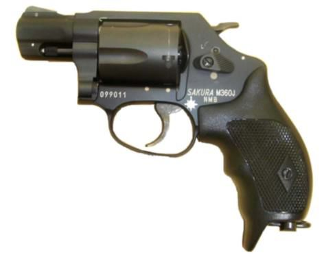 海上保安庁の携行武器について名 称：サクラ M360J装弾数：5発（38スペシャル弾）材 質：スカンジウム合金特 徴：重量が419 gと非常に軽量※各警察機関もSAKURA M360Jを導入している。